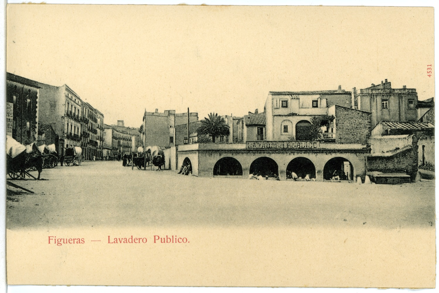 Figueras; Lavadero Publico This postcard is from publisher Brück & Sohn in Meißen ( postcard has a unique number 04531 and is available in a higher resolution at the publisher. This images was uploaded in a cooperation project between Wikipedians and the publisher.